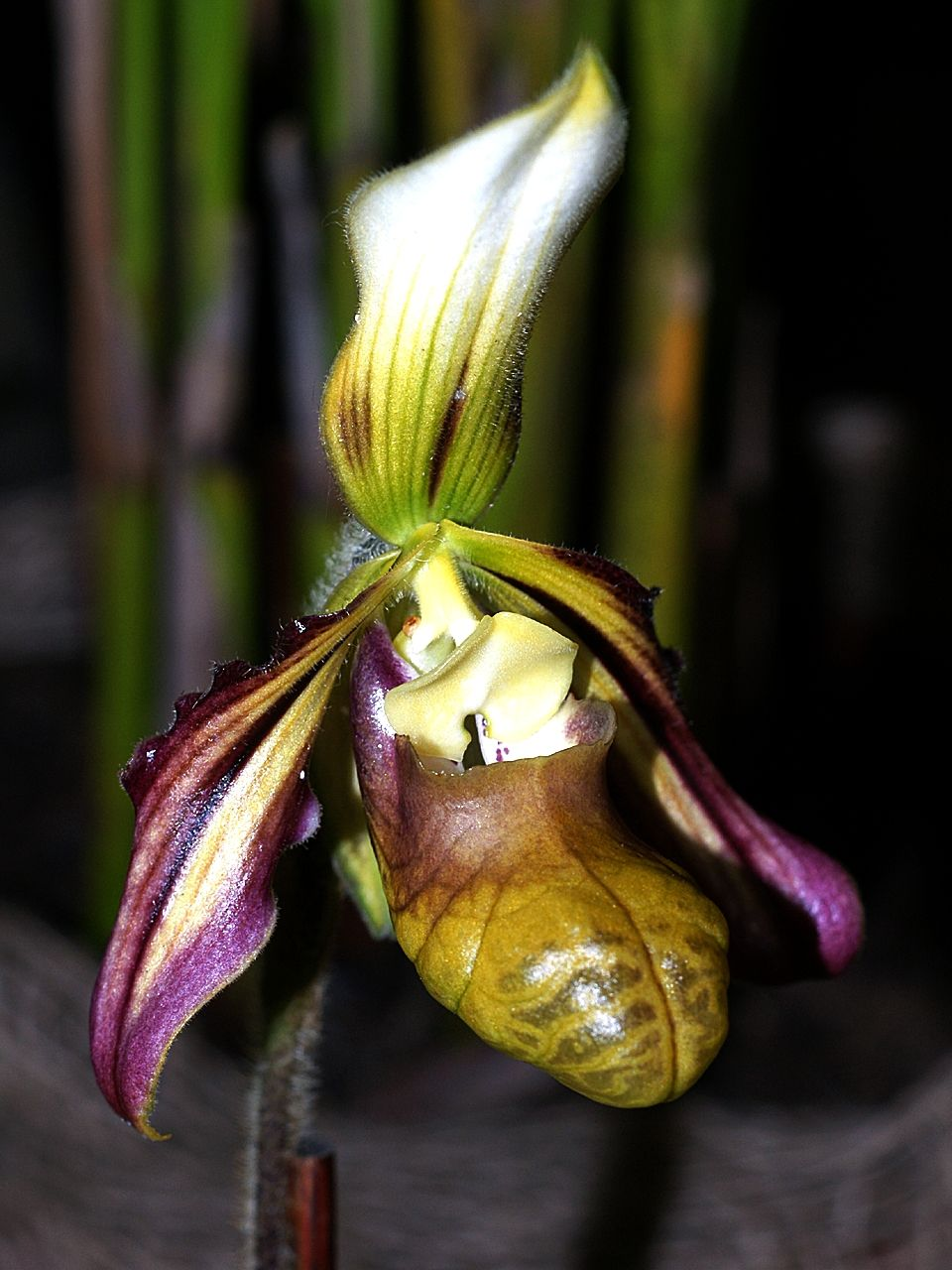 Paphiopedilum sangii